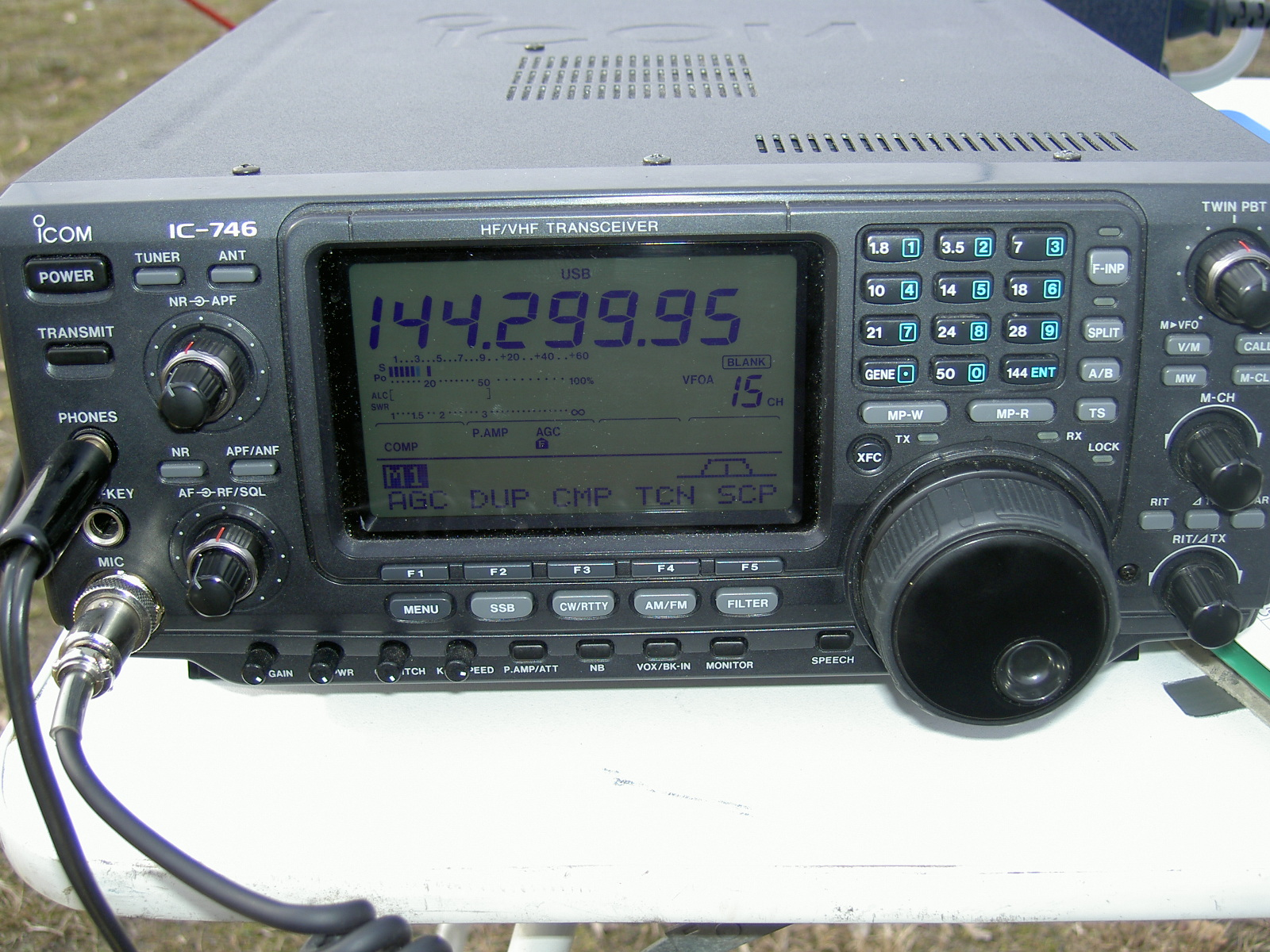 Funkgeärt ICOM IC-746